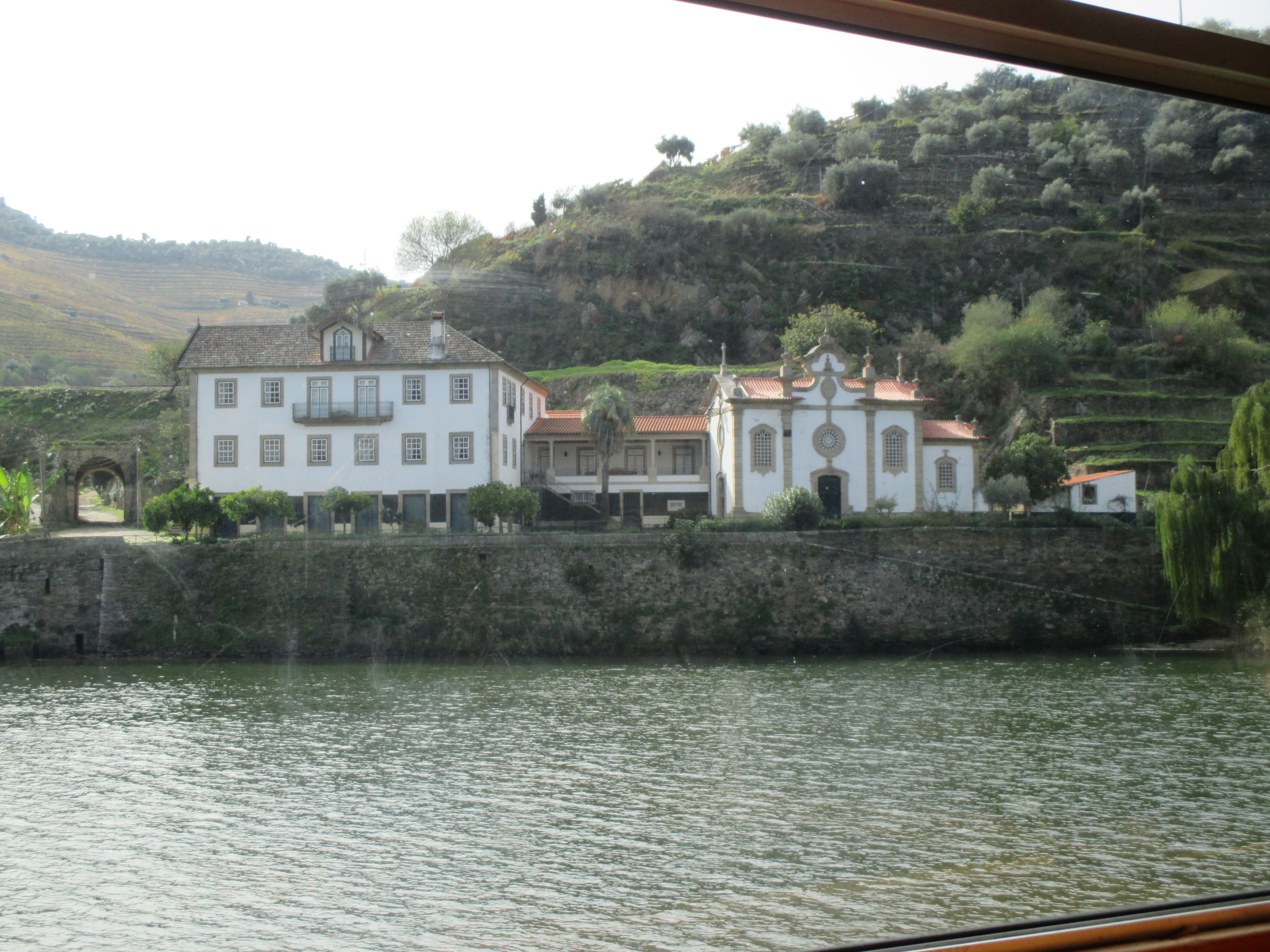 Quinta do Vesúvio. Numão, Vila Nova de Foz Côa. MV Douro Prince. From Pinhão to Vega de Terron.